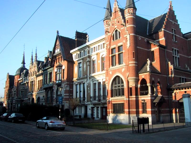 Antwerpen: Cogels Osylei / Selbstfotografiert / Lizenz: GNU FDL Belgien